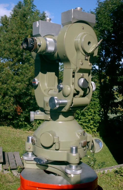 Klassisk teodolitt * Wild T2